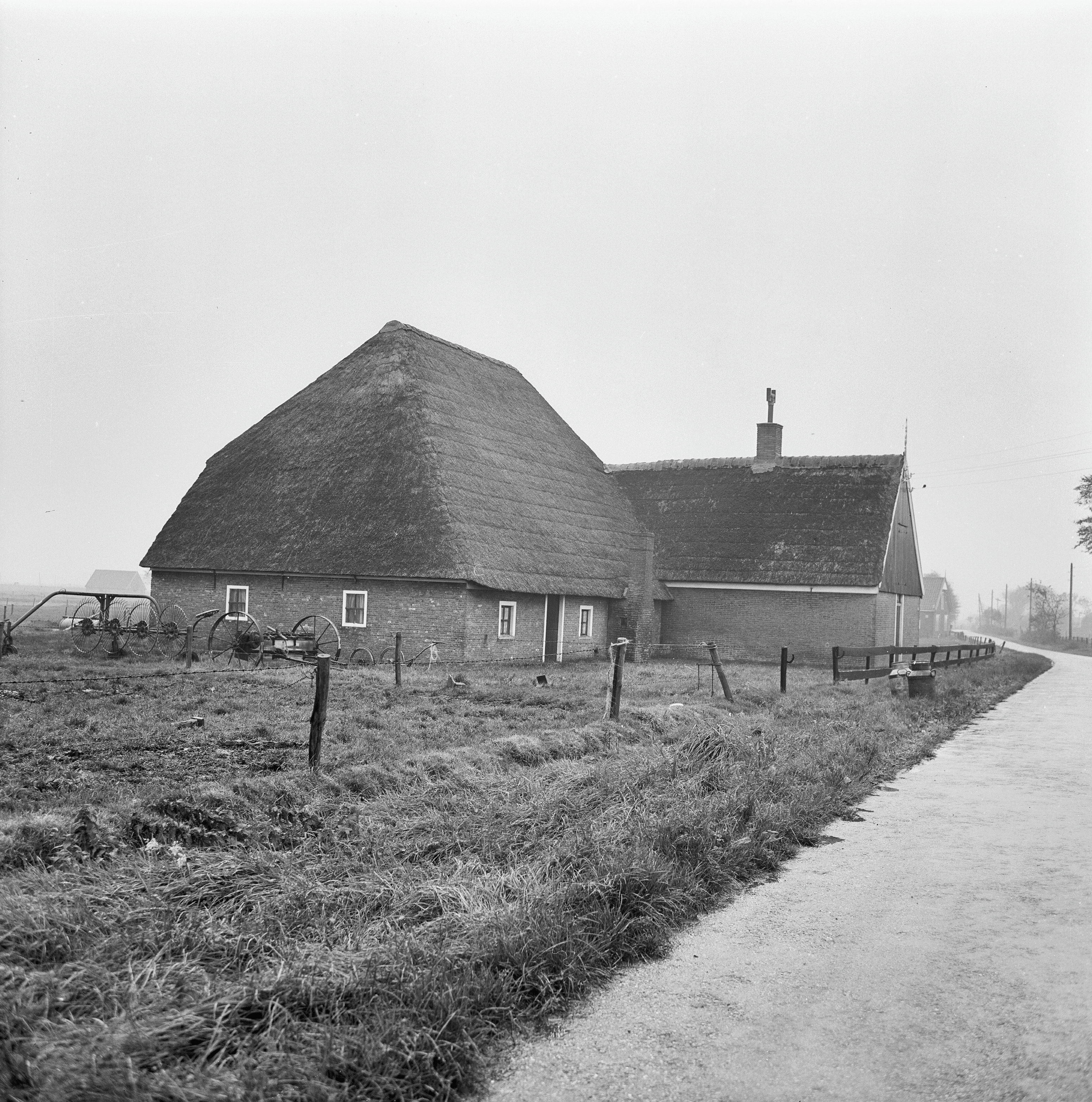 aanzicht